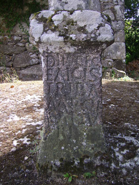 Ara hispanorromana de Zaparín, Cortegada, Ourense.